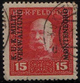 Марка полевой-почты Австро-Венгрии для оккупированной Черногории